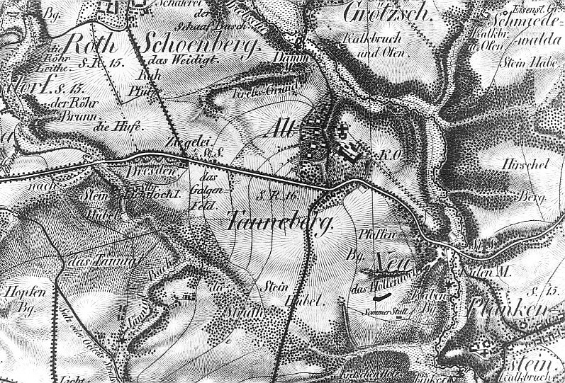 Original image description from the Deutsche Fotothek Triebischtal-Tanneberg. Ausschnitt aus: Oberreit, Sect, Freiberg, vor 1843